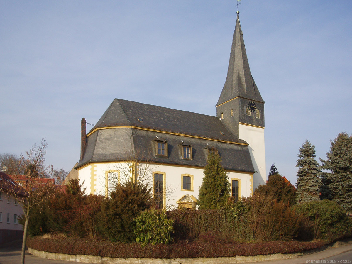 Evang. Kirche in Hüffenhardt